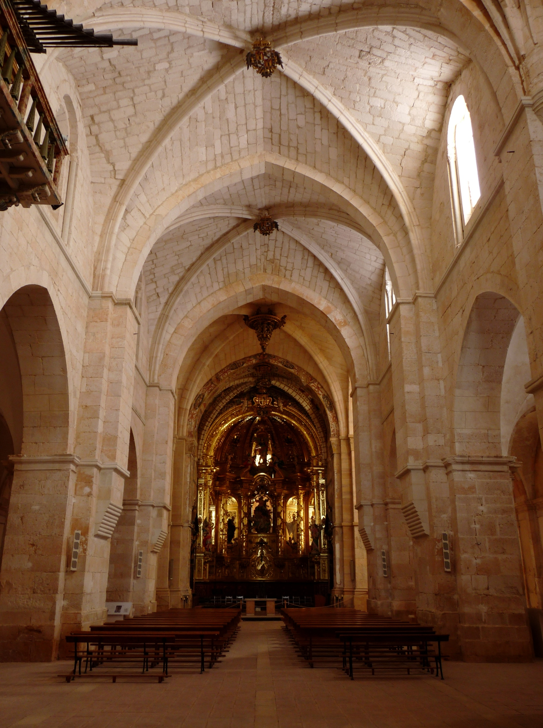 Monaterio de Santa María de Huerta - Interior de la iglesia - Vista desde el pie